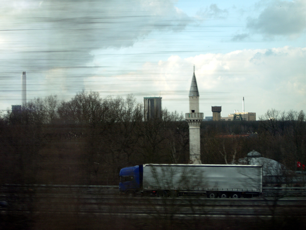 Blick aus der S9 über Marl-Hamm auf die A52, die Fatih-Moschee an der Carl-Duisberg-Straße/Bachackerweg, die Förderanlagen der Zeche Auguste Victoria 3/7 und die Schlote der Chemiepark-Kraftwerke. See where this picture was taken. [?]